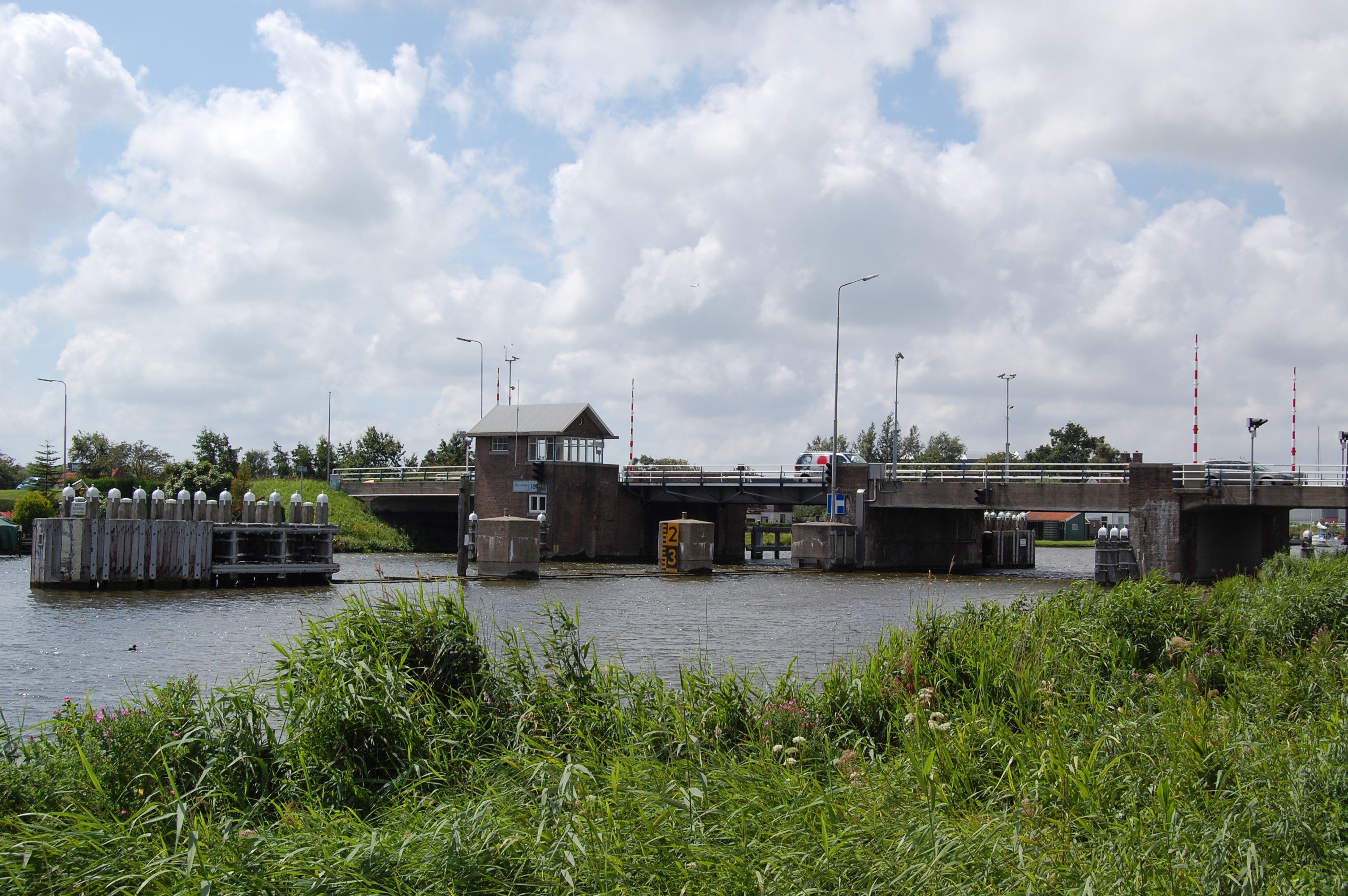 De Beatrixbrug over de Tapsloot bij Westknollendam (In Zaandam is another Beatrixbrug over the Zaan)